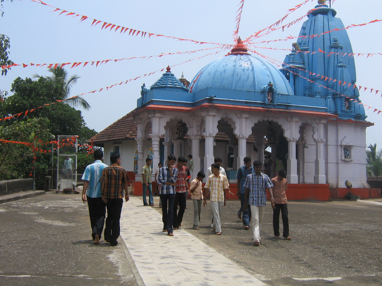 Nithyananda Ashramam Kanhangad